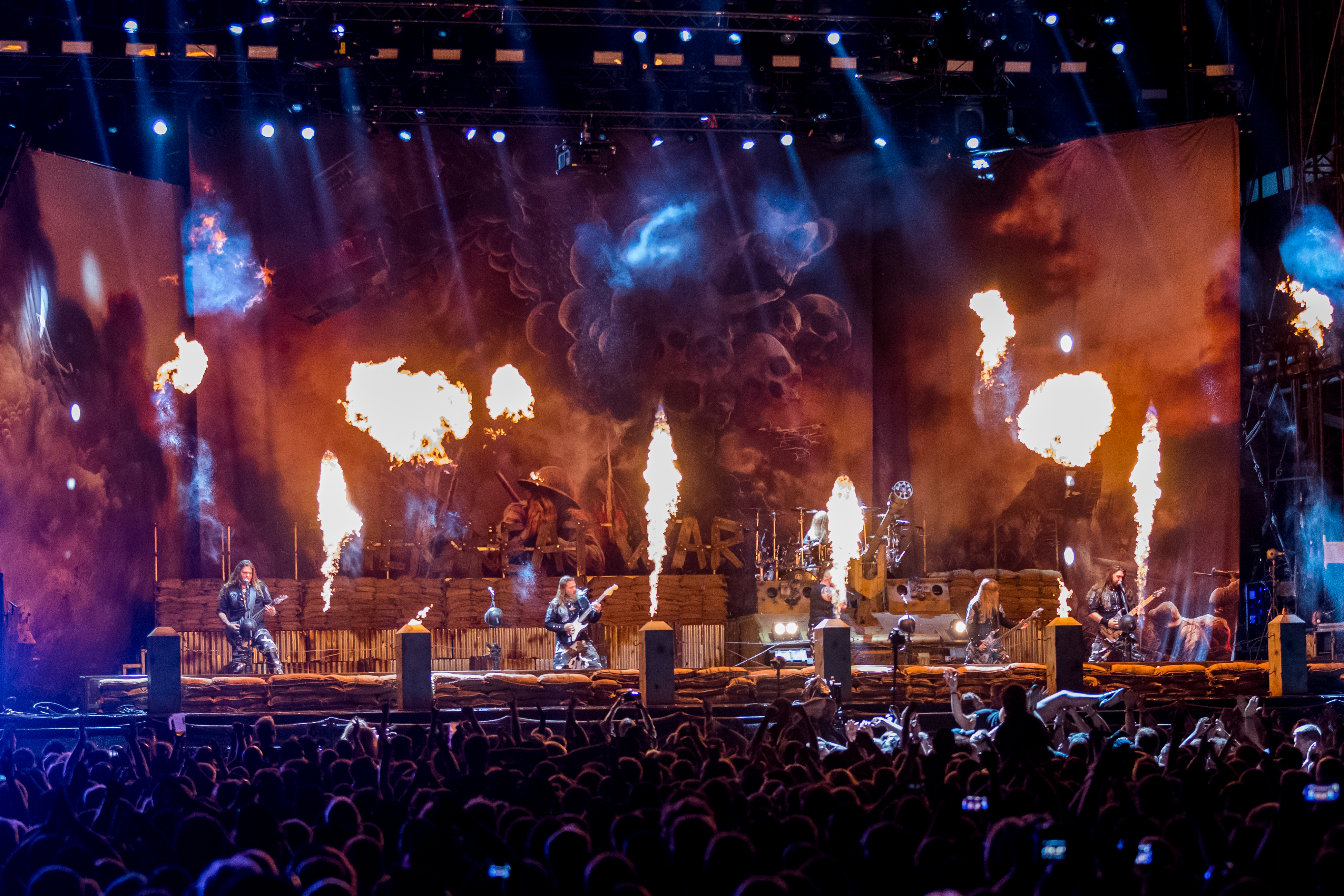 Sabaton during Wacken Open Air at The Holy Wacken Land, Wacken, Schleswig-Holstein, Germany on 2019-08-01, Photo: Sven Mandel